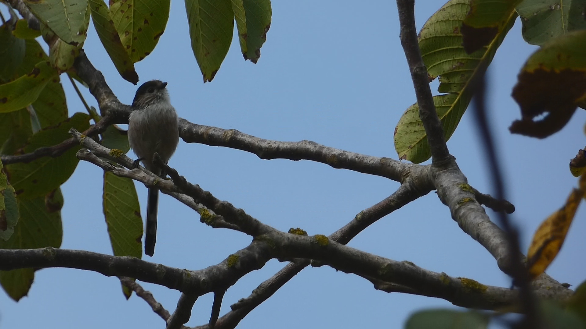 Codibugnolo, su un noce.